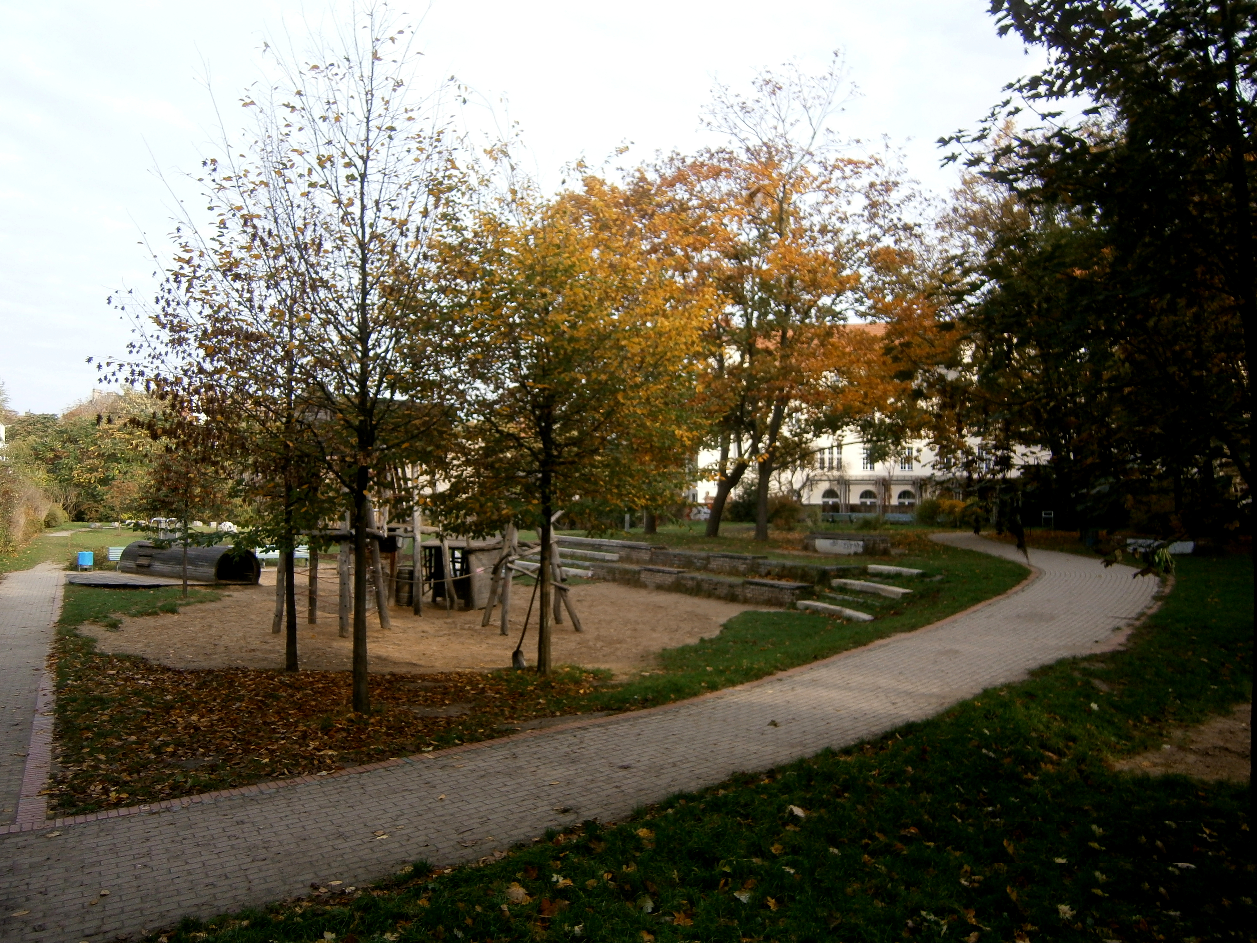 Eine Grünfläche im Berliner Ortsteil Weißensee wurde im Zeitraum der Sanierung von Weißensee-Süd (Sanierungsgebiet) als Spielplatz mit "Fischdesign" auf 4200 m² angelegt. Sie liegt nördostlich vom Antonplatz. Der Name wurde 2007 vergeben mit Bezug auf eine bis in die 1970er Jahre vorhandene Fischkonservenfabrik.